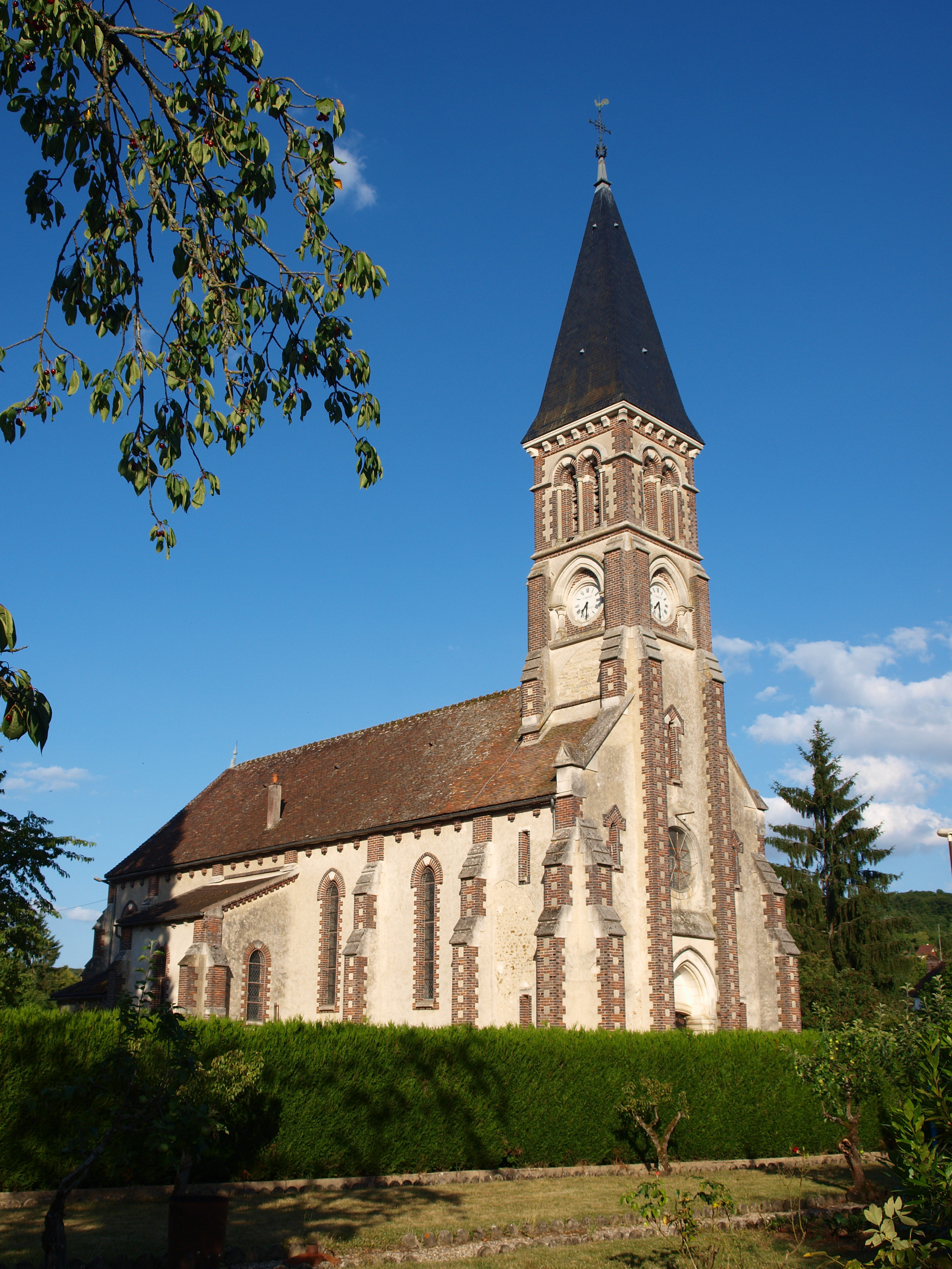 Armeau (Yonne, France) ; l'église